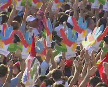 Madrid previo a la desición final del COI a saber quien será la ciudad anfitriona para los JJ.OO de verano de 2016